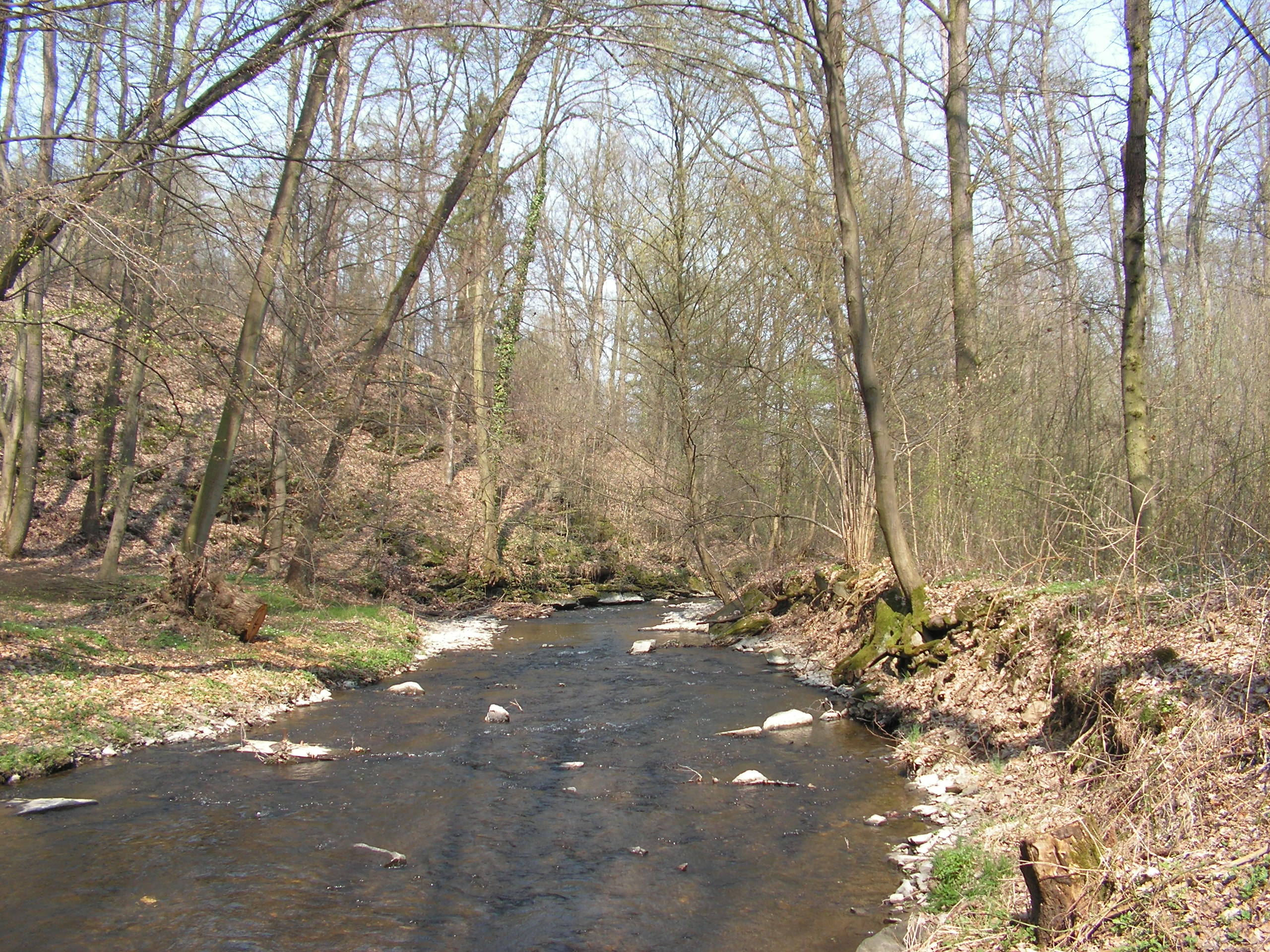 Klejnárka u Chedrbí.